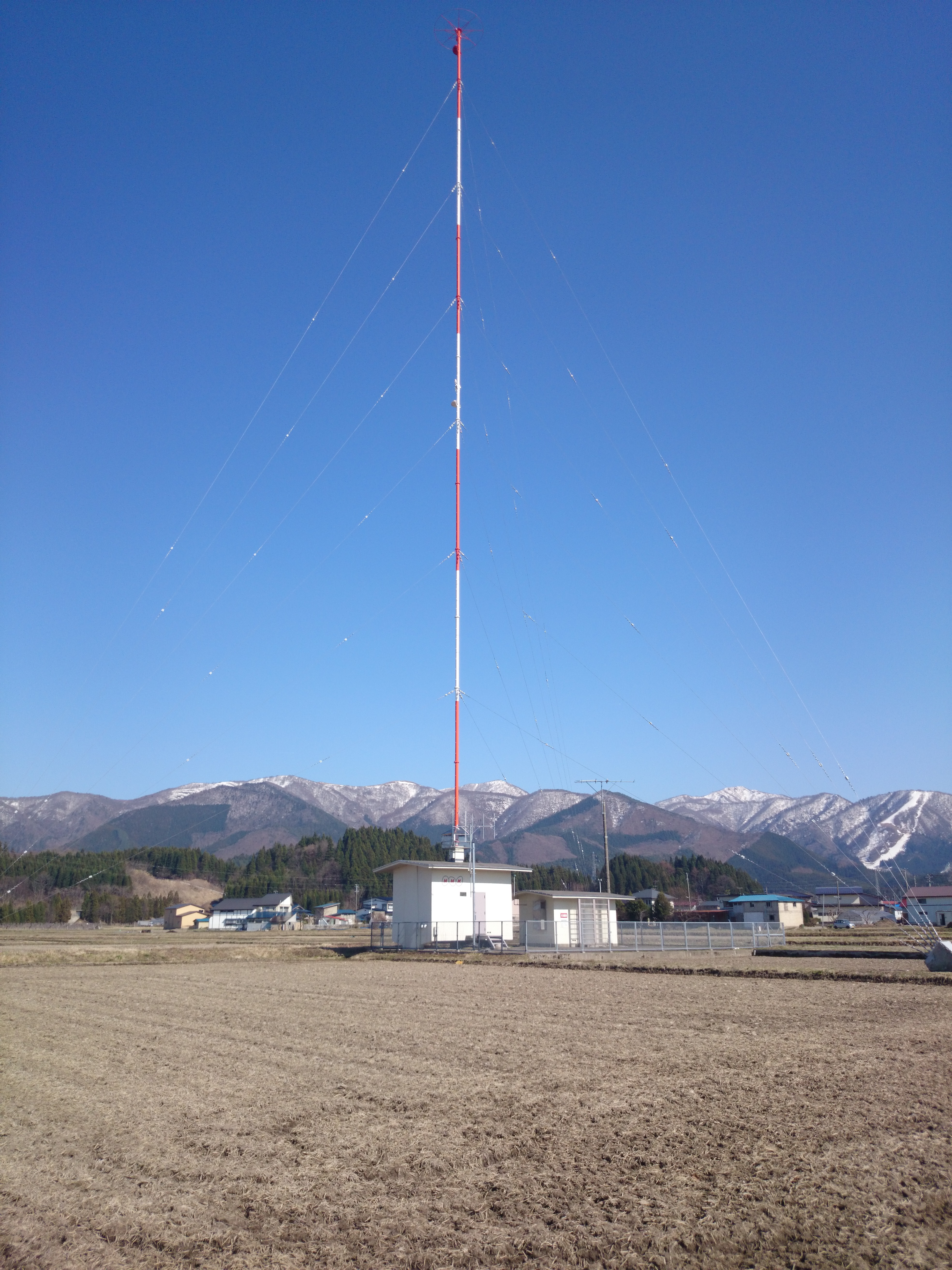 ＮＨＫラジオ鹿角中継局２